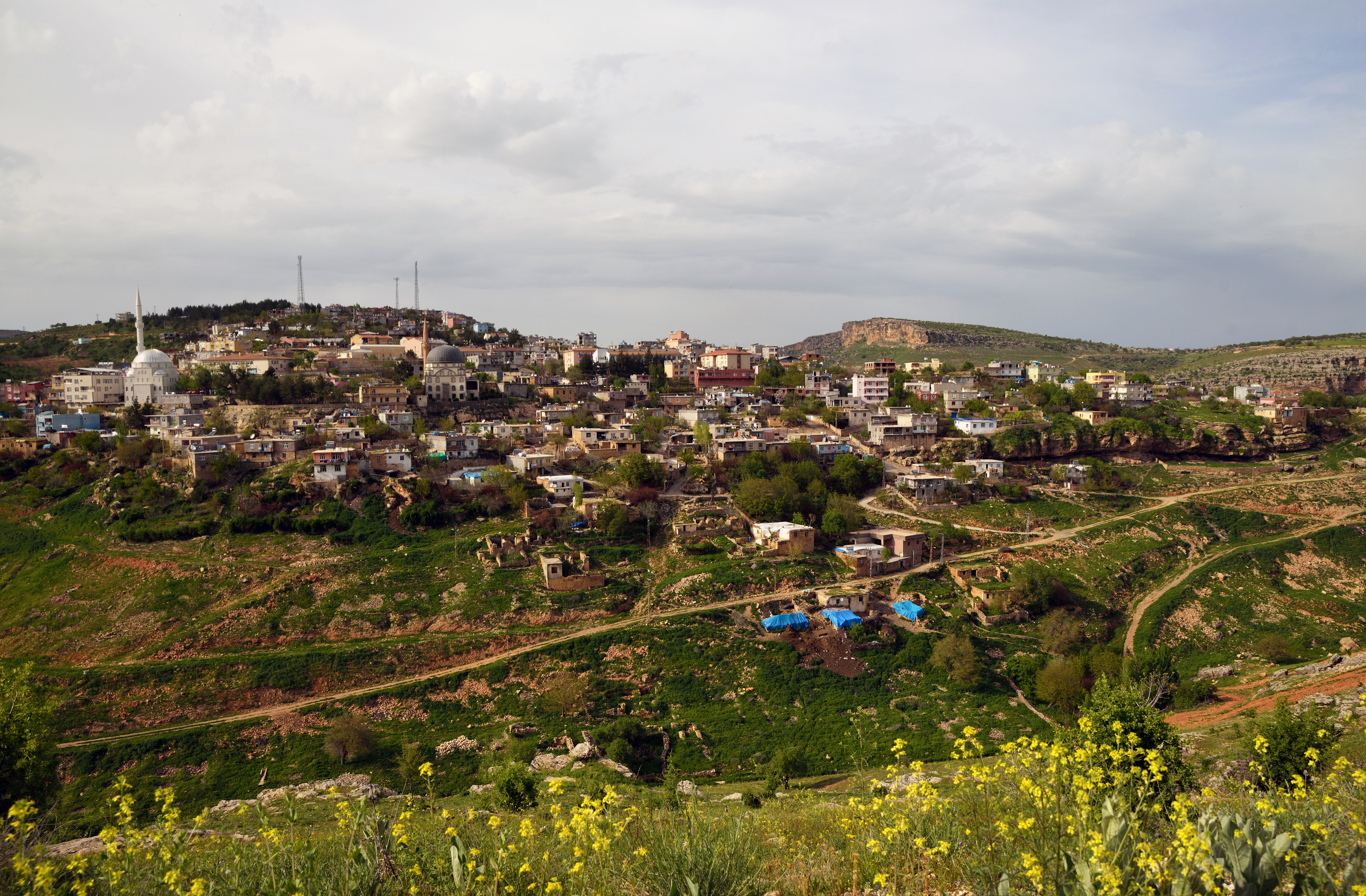 Kurdî: Dîmenek ji Gêlê